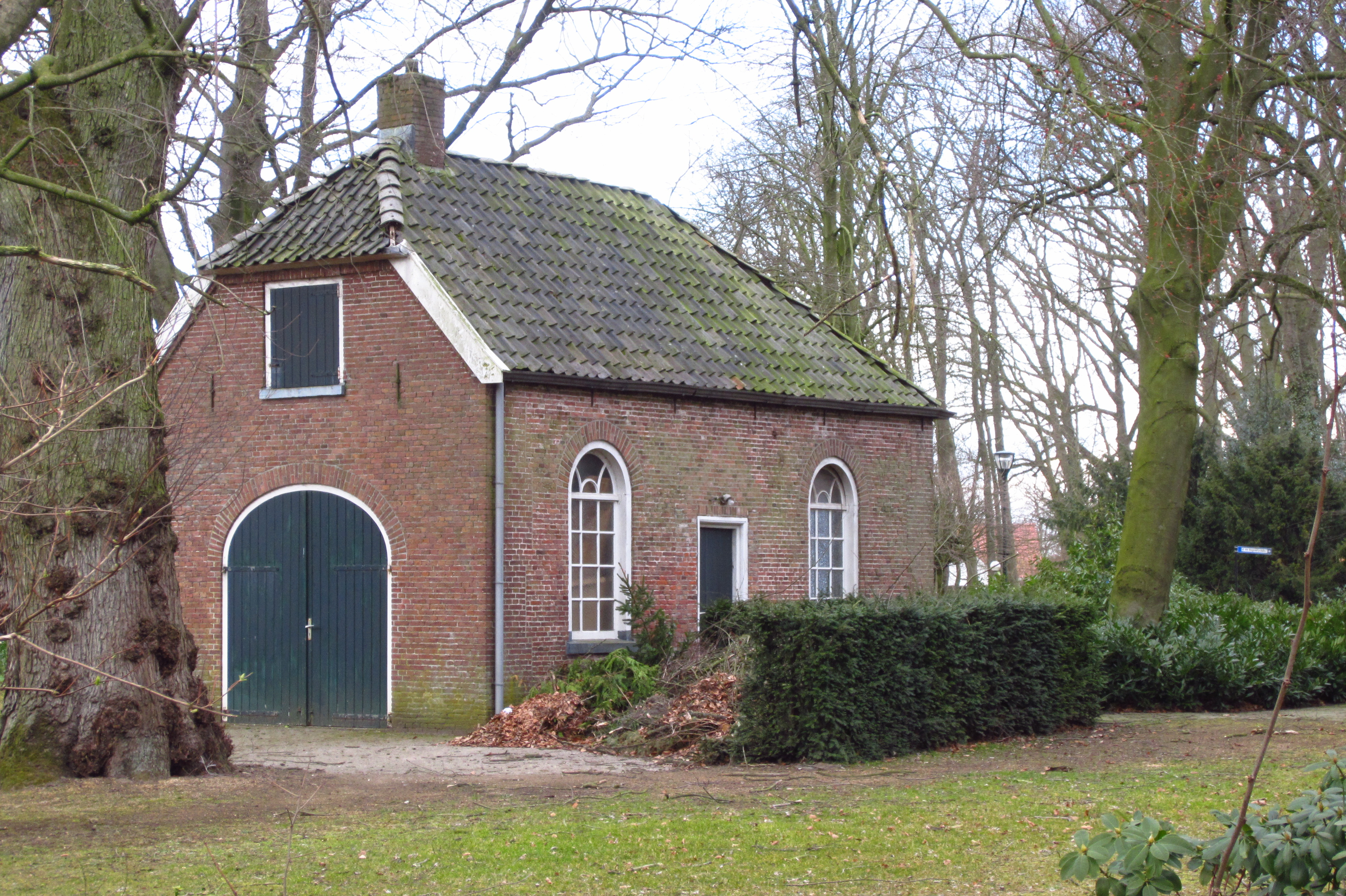 Pand Goorsestraat 19 te Hengevelde. Gemeentelijk monument Hof van Twente.